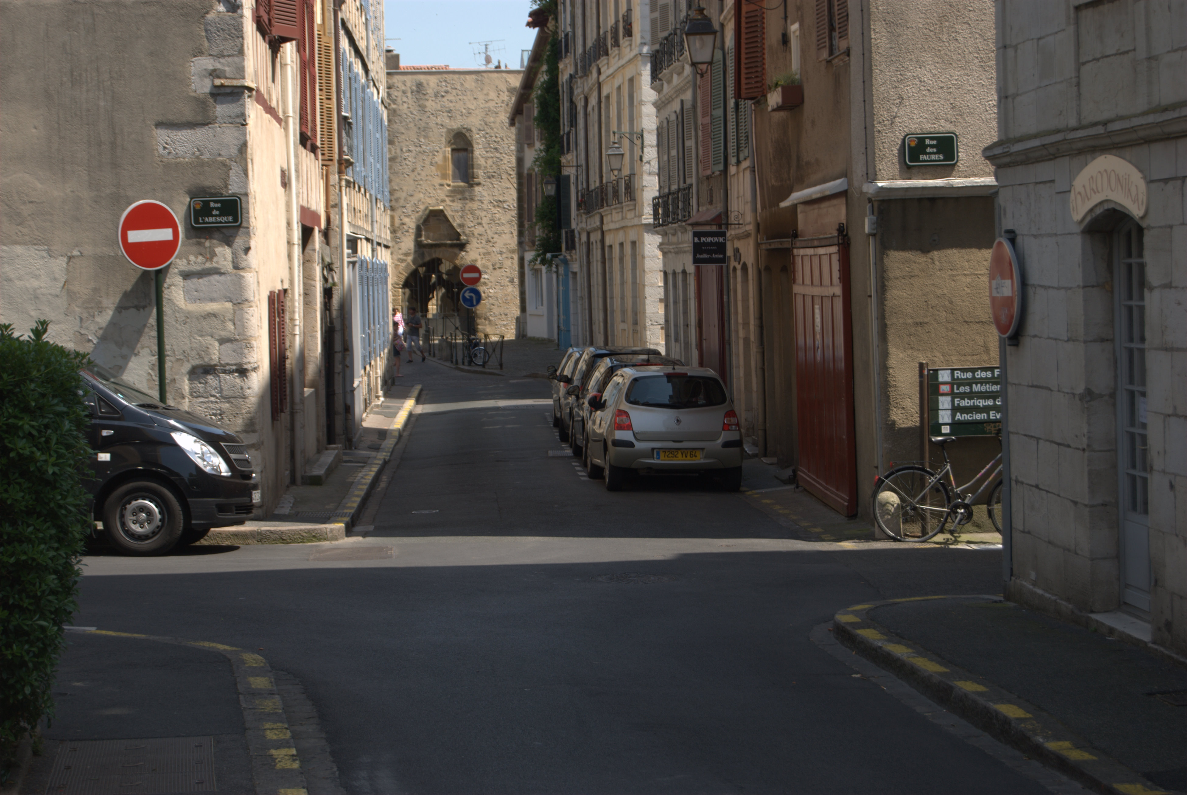 La rue des Prébendés, carrefour avec les rues des Faures et de l'Abesque.